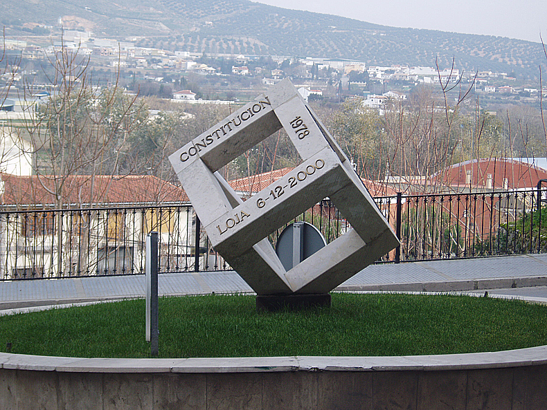 Monumento a la Constitucion de 1978 en Loja, Granada.